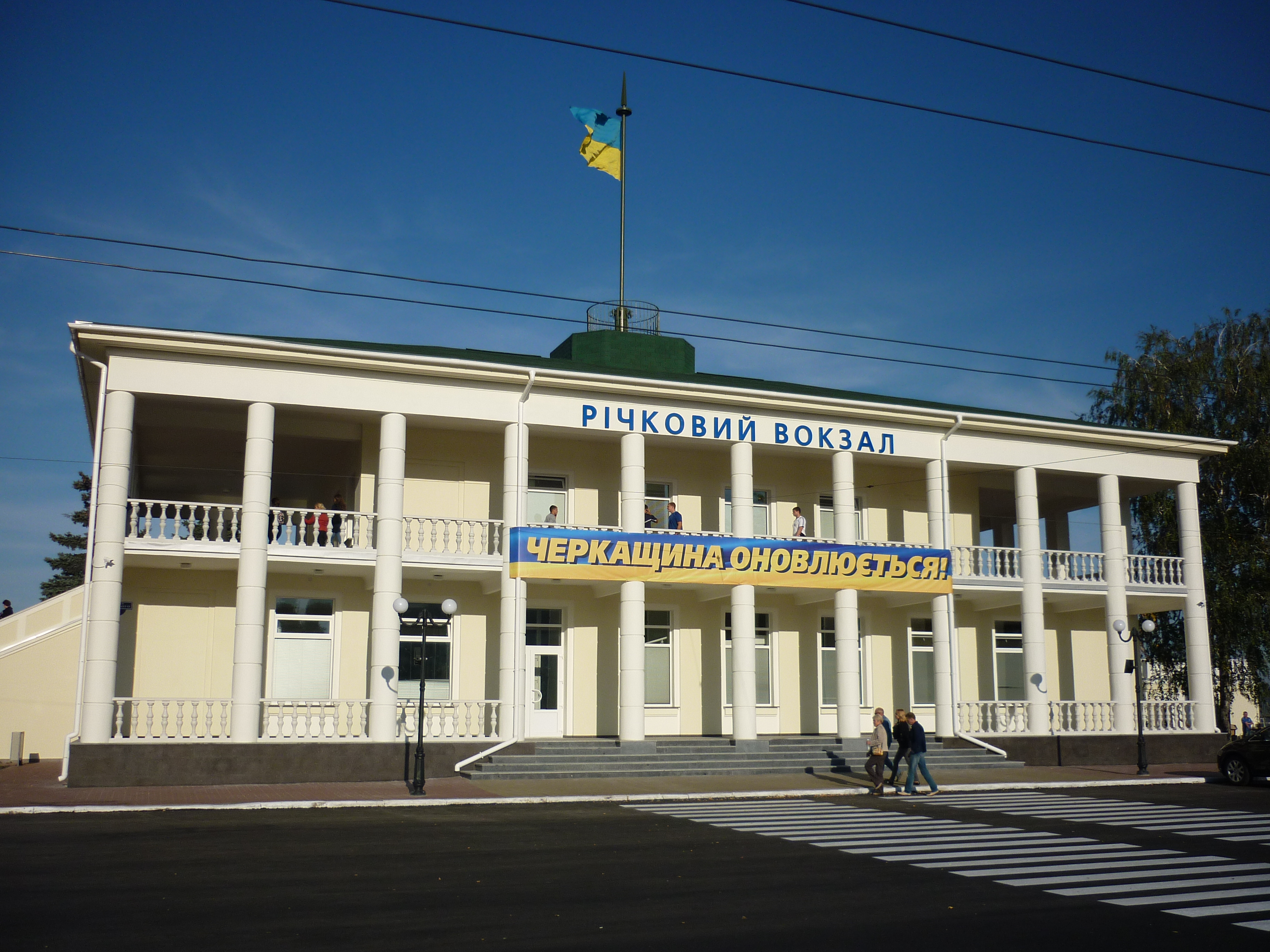 Відбудований та реставрований річковий вокзал в Черкасах